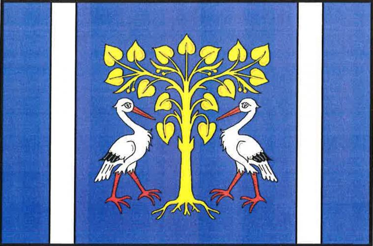 Lípa nad Orlicí vlajka